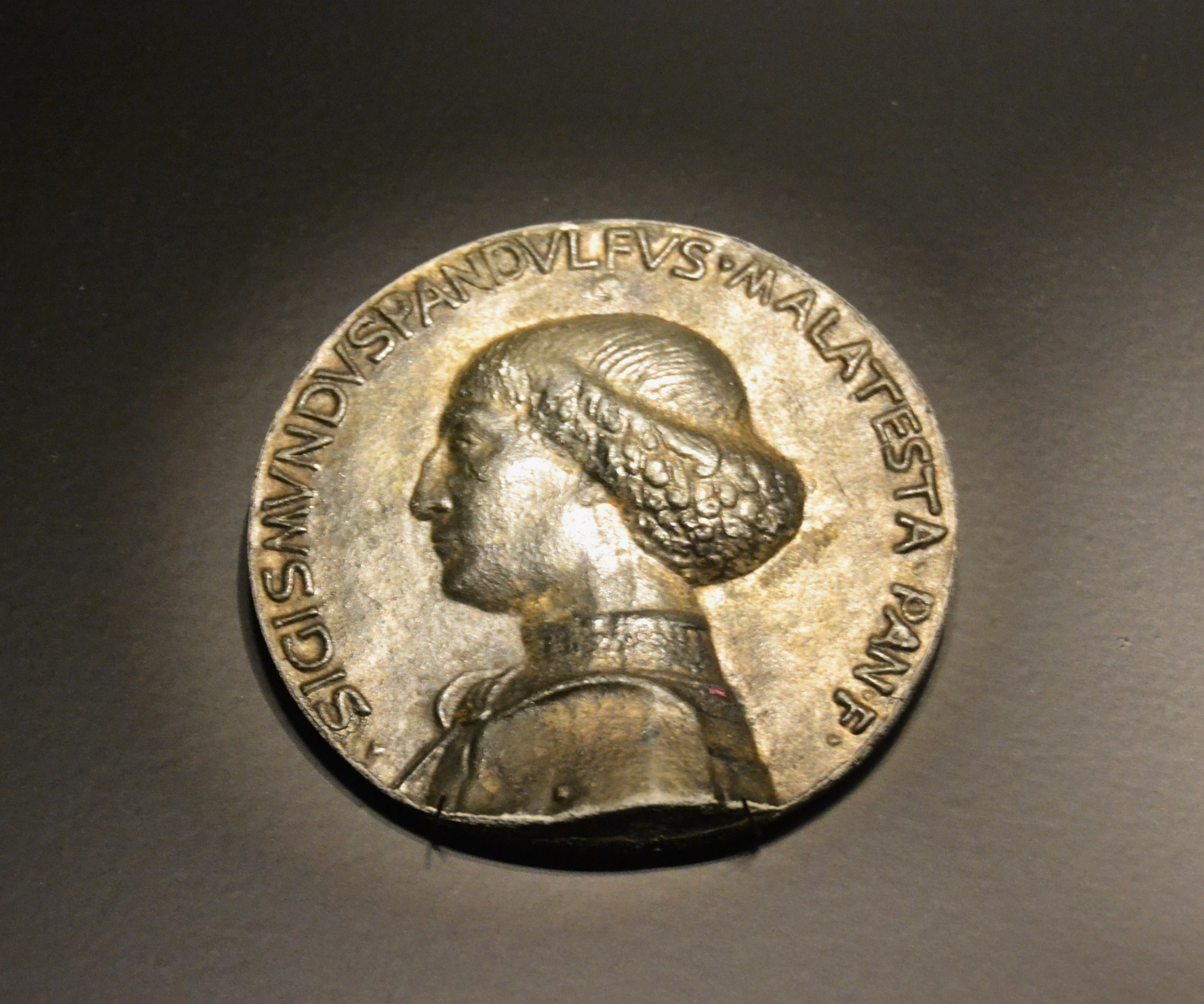 Medalla de Sigismondo Pandolfo Malatesta, Matteo de Pasti, Museu de Prehistòria de València.